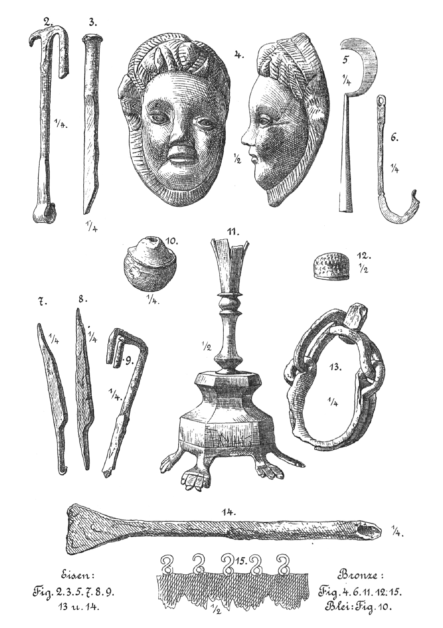 Metallfunde aus dem Kastell Böckingen, ORL 56